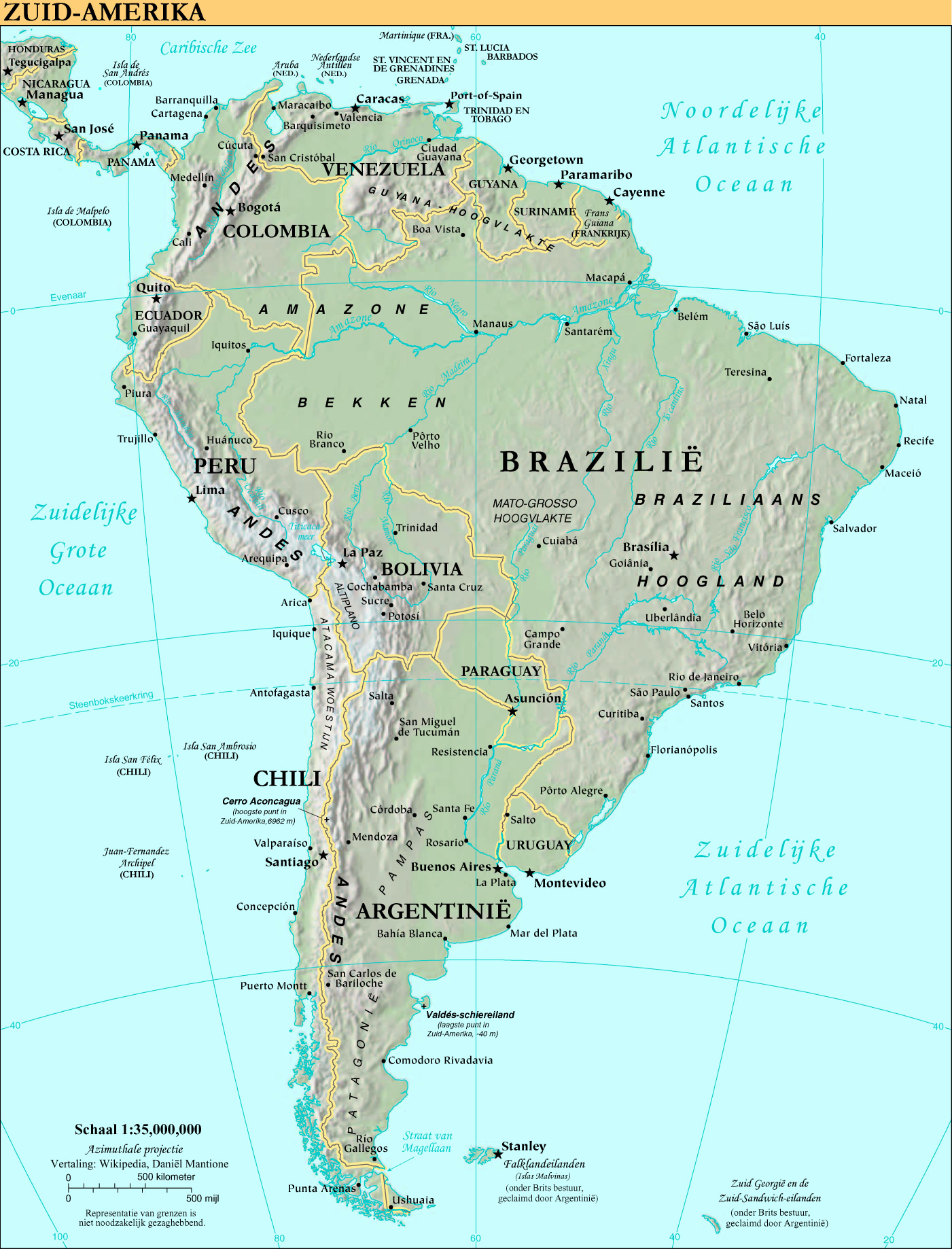 Vertaling CIA-kaart door Daniël Mantione. Gerenderd op 200 DPI